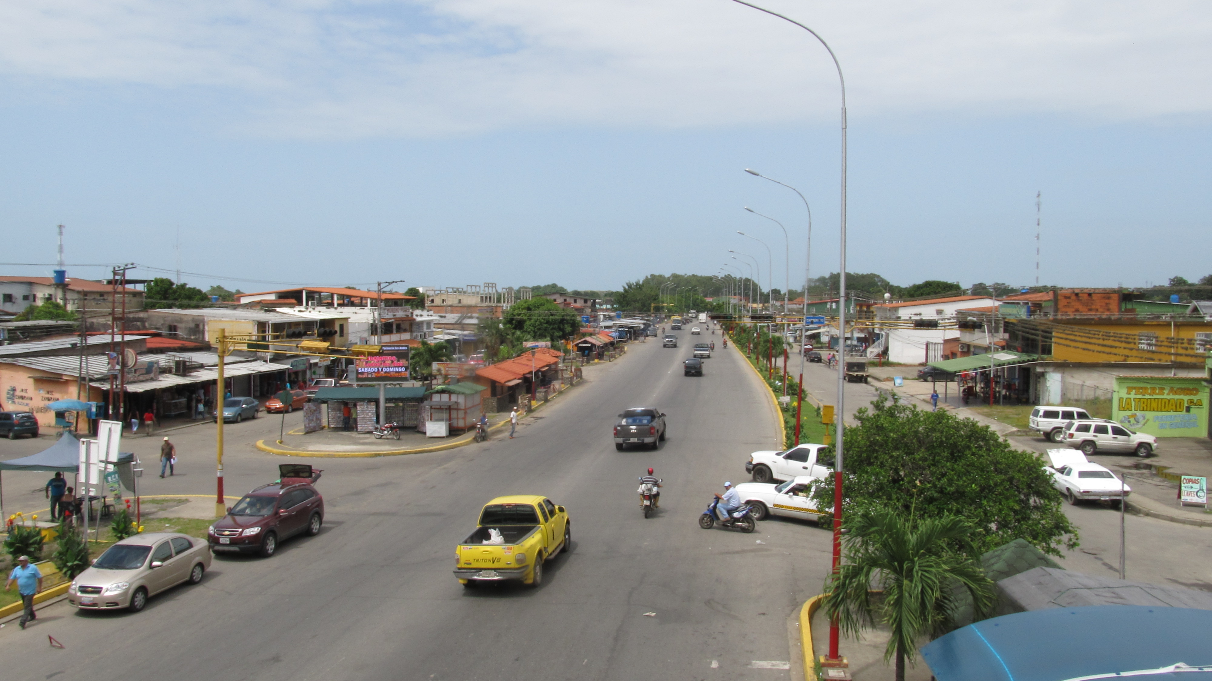 Foto tomada desde la troncal 5 a la localidad de Socopó (estado Barinas), Venezuela